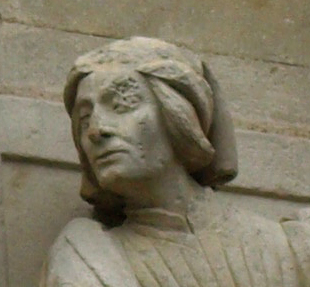 Porträt von Jacques Cœur am Giebel des Palais Jacques Coeur in Bourges, Skulptur, 15. Jahrhundert.